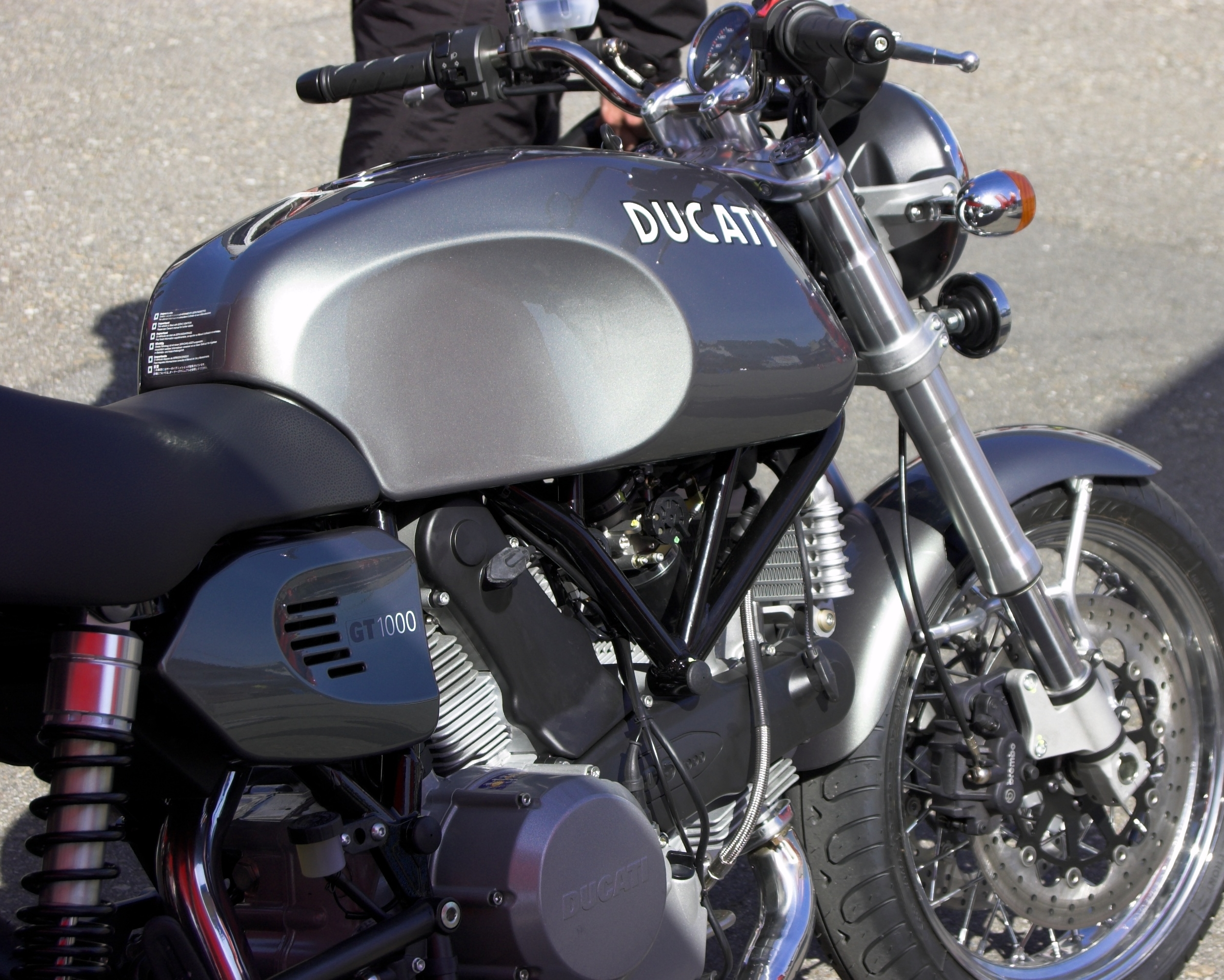 2006 Ducati GT1000